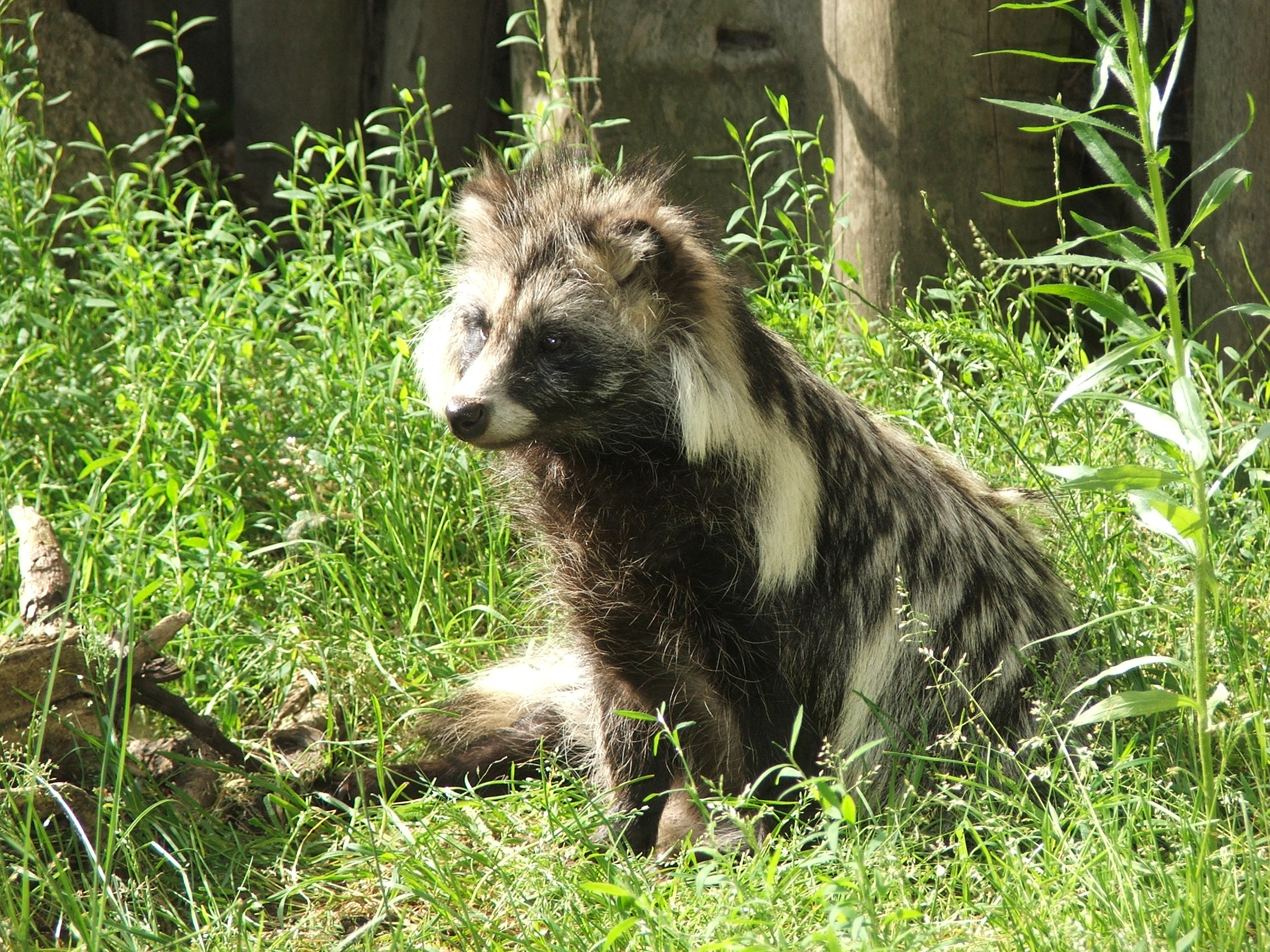 Nyctereutes procyonoides (ZOO in Ueckermünde)